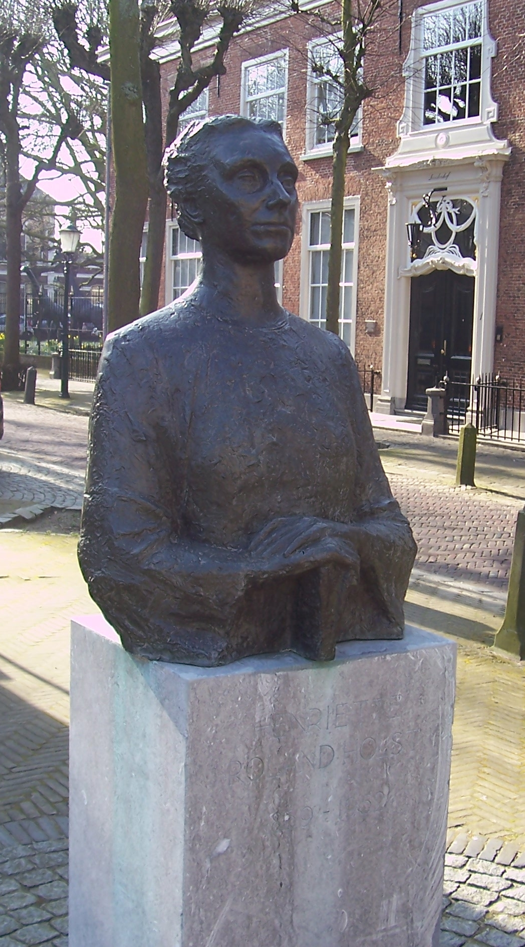 Noordwijk, Lindenplein.